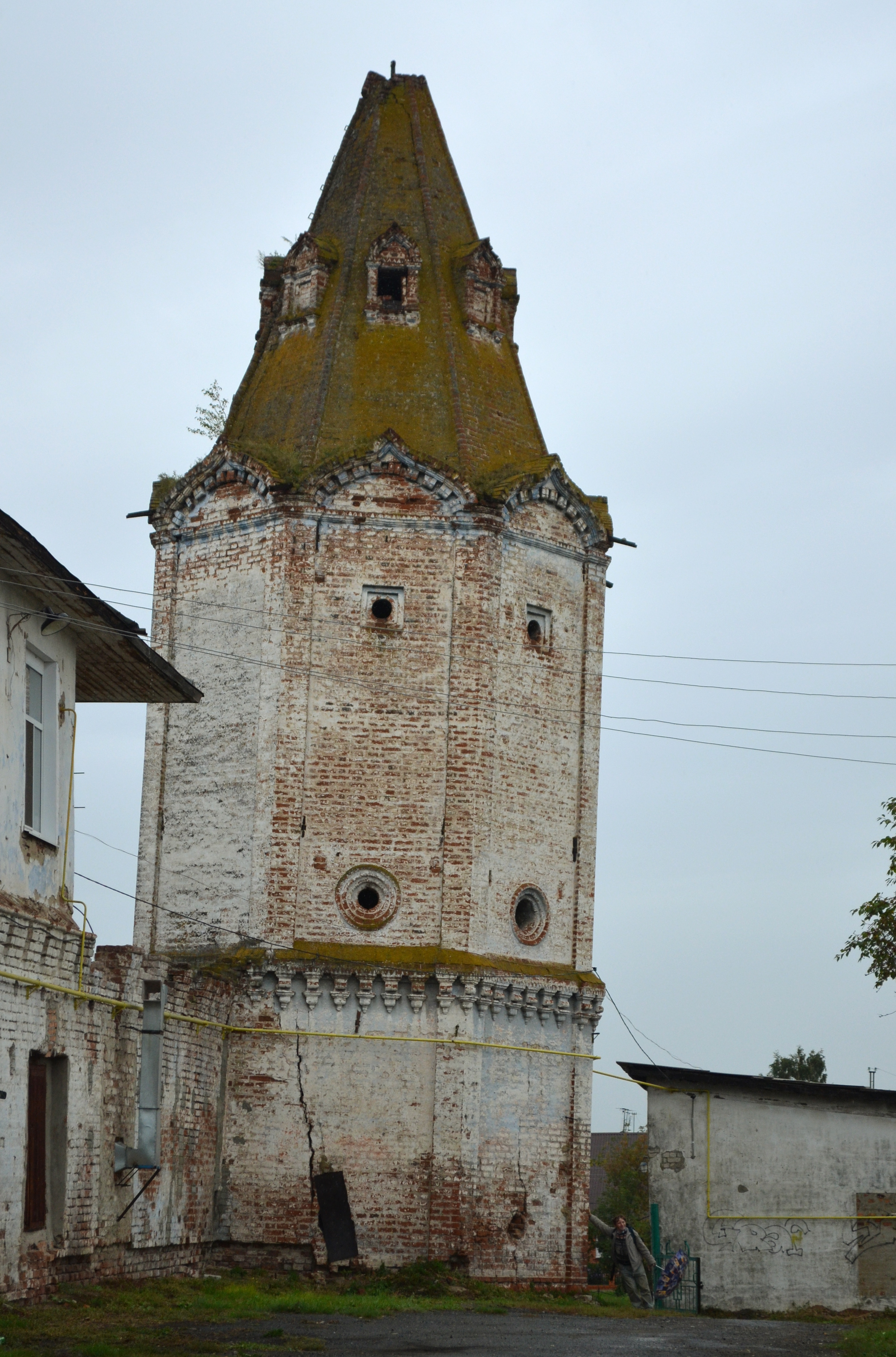 Башня юго-восточная (Курганская область, Далматово, улица Советская, 63)